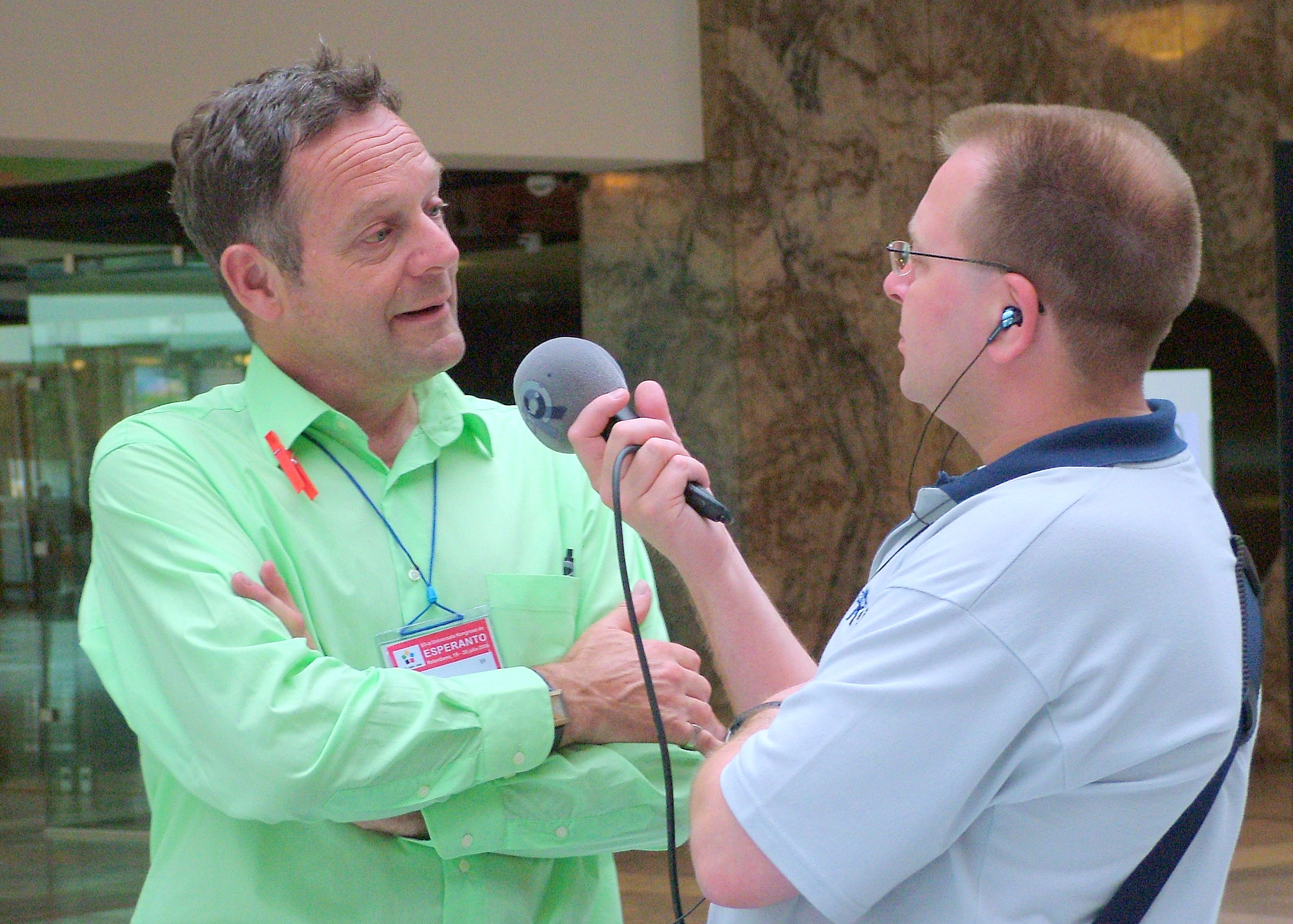 Universala Kongreso de Esperanto, Roterdamo 2008. LKK-ano Bart de Wit kun jxurnalisto.